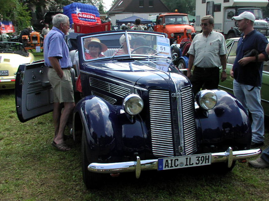 Audi 920 (1939)